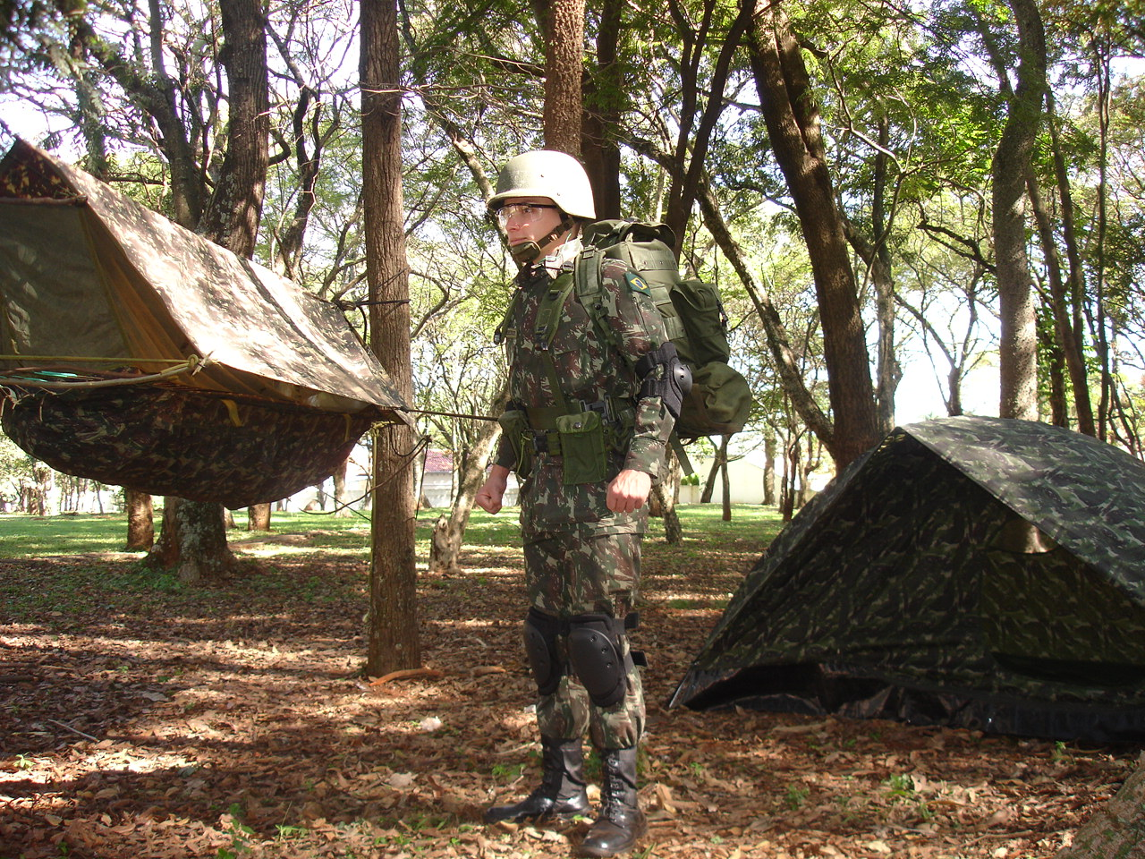 Aluno Equipado